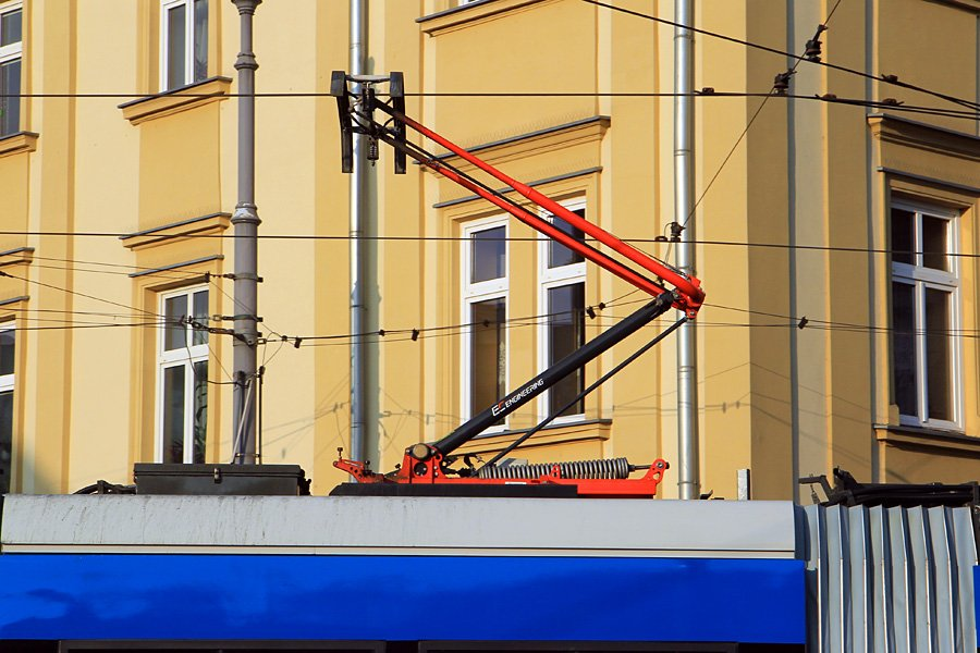 Pantograf typu 120ECI produkcji EC Engineering na dachu tramwaju typu NGT6 w Krakowie.